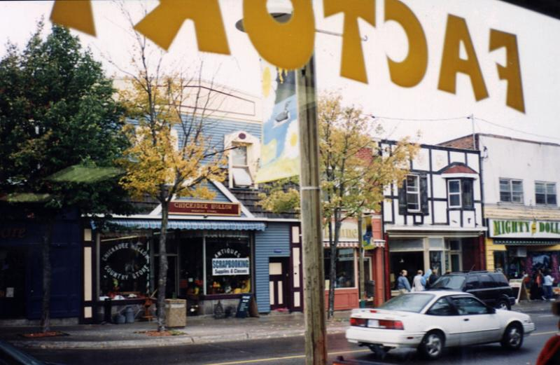 Gravenhusrt Main street格雷文赫斯特商业区